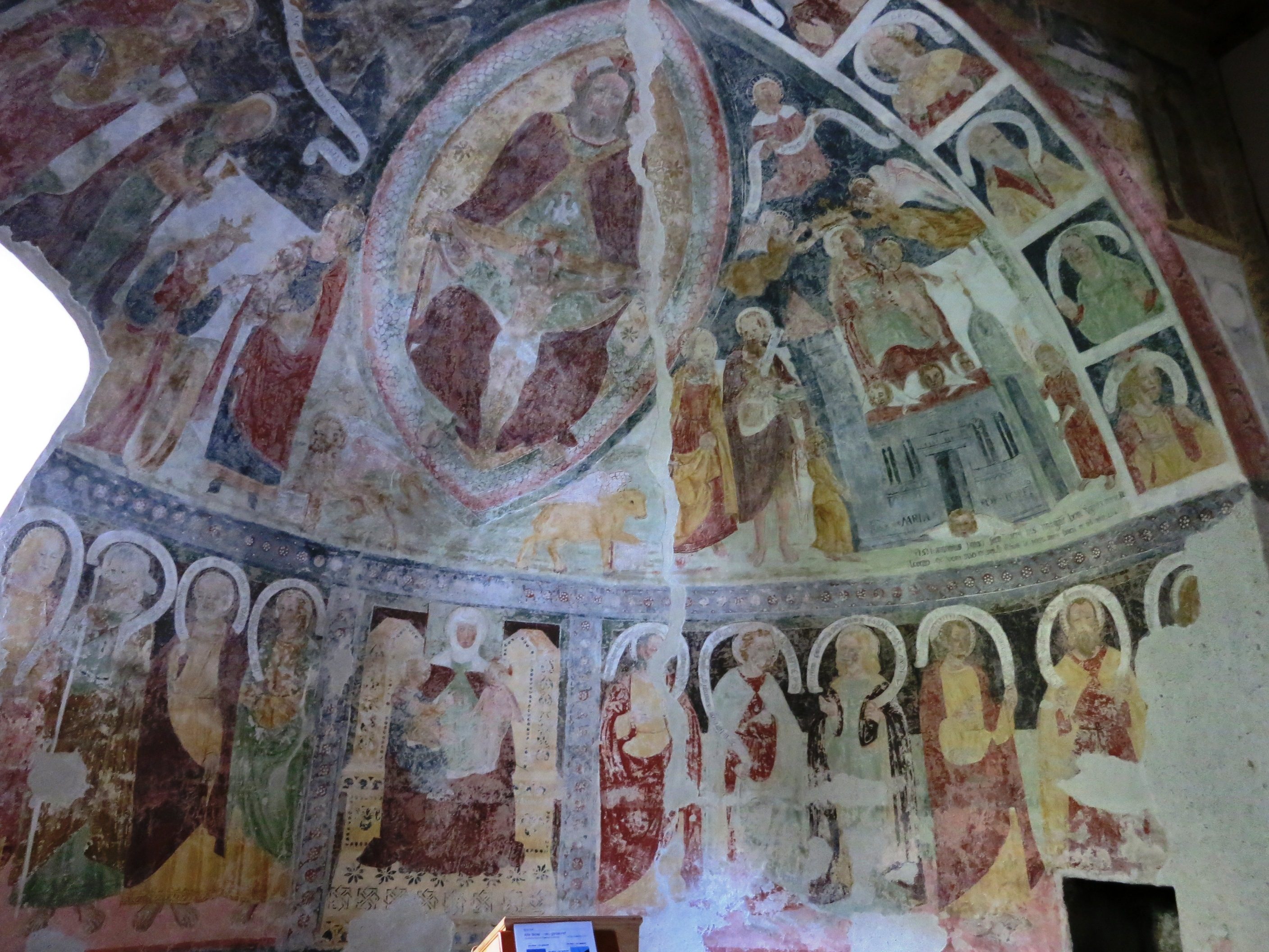 Bergkirche Fex Crasta, Sils im Engadin GR, Schweiz